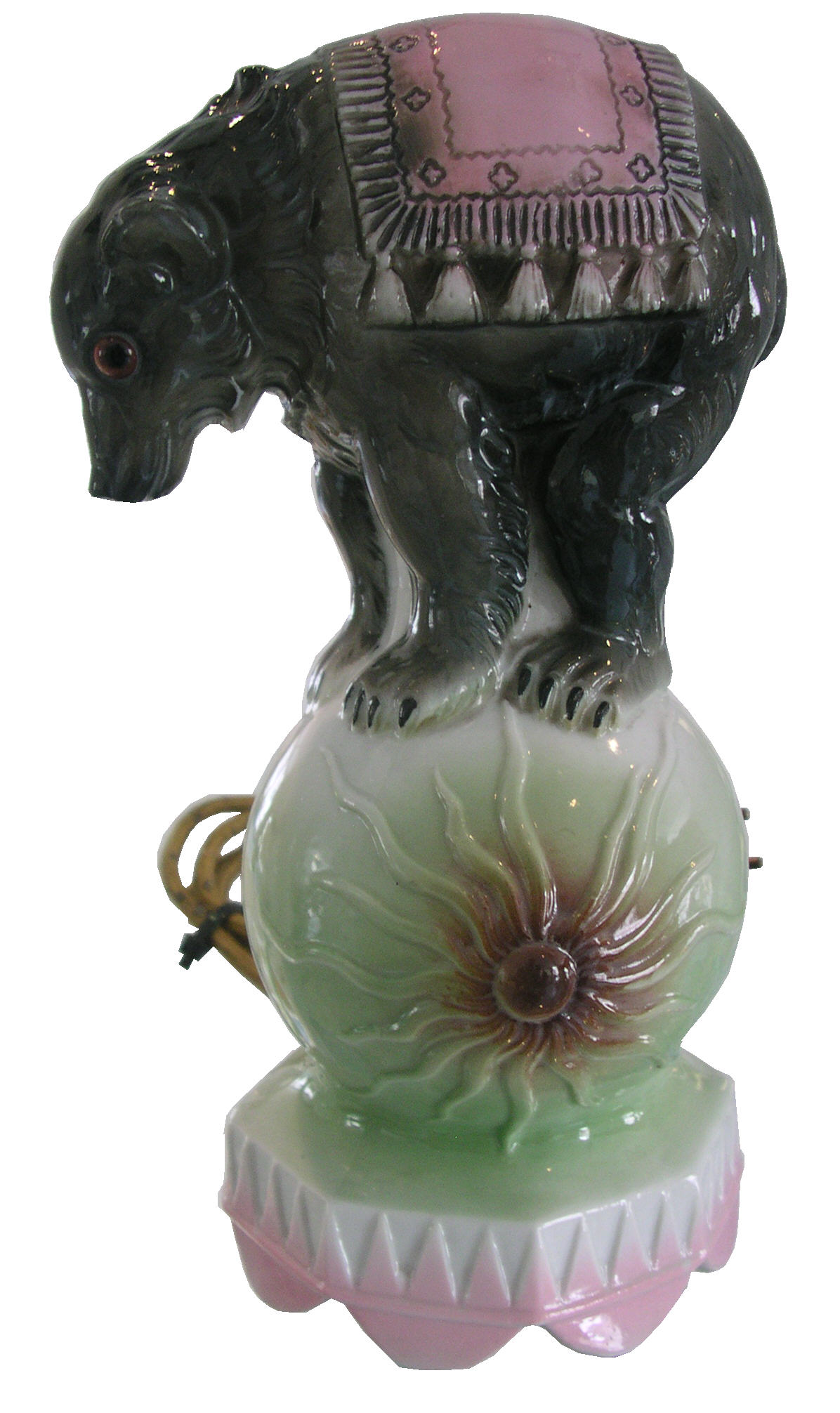 Rauchverzehrer im eon-Energiegeschichten-Museum in Hannover